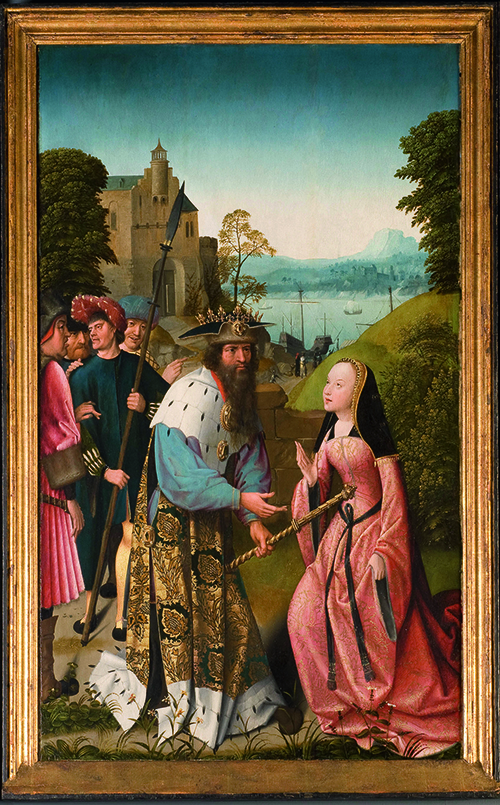 Goswyn van der Weyden, Dymphna, 1505, olieverf op eiken panelen, 120 x 71 x 5,5 cm.